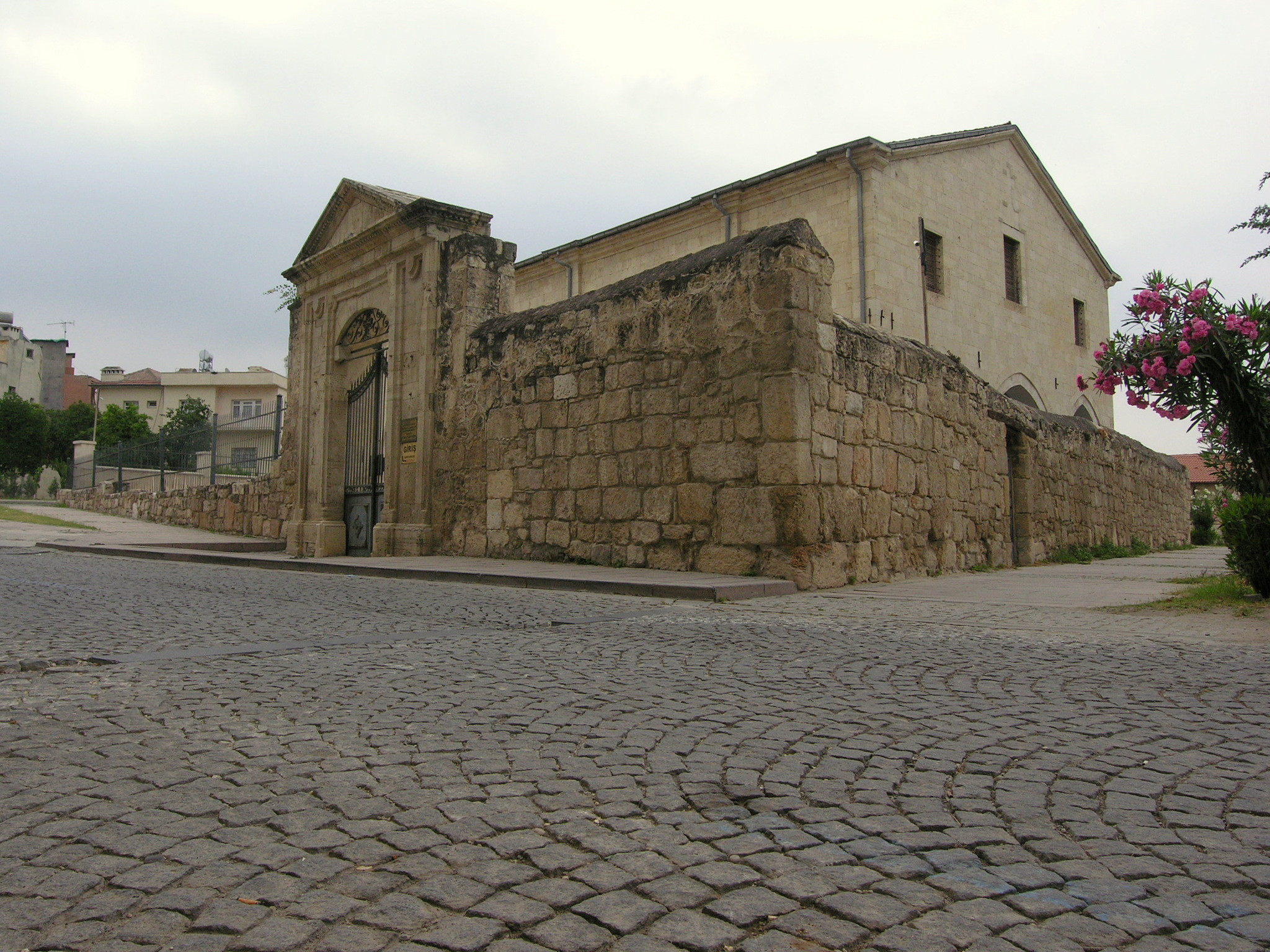 St Pauls Church